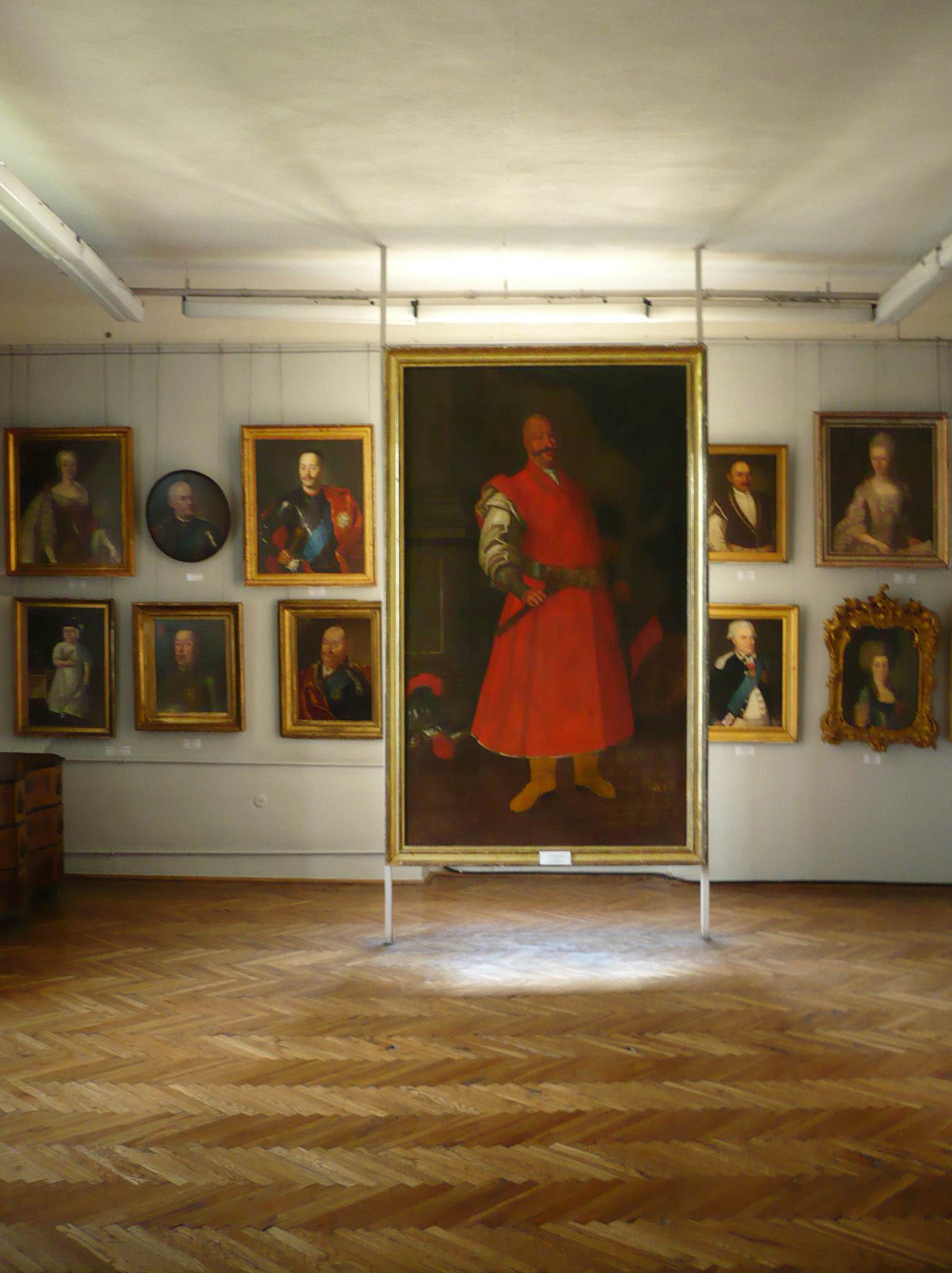 ? Ісихій Головацький ЧСВВ. Портрет Миколи Василя Потоцького з церкви Воздвиження Чесного Хреста Господнього (Бучач) (див.: Barącz S. Pamiątki buczackie. — Lwów : Drukarnia «Gazety narodowej», 1882. — S. 128.); існували копії портрету